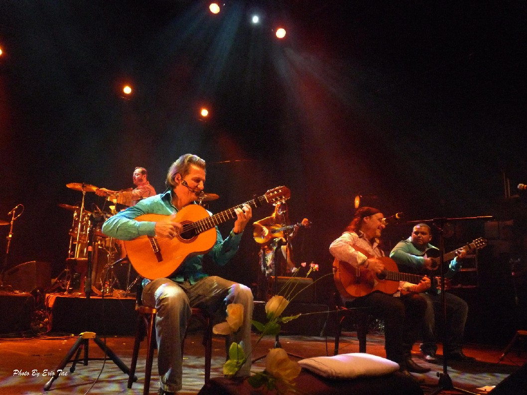 Yvan le Bolloc'h en concert à Elmediator à Perpignan Sept 2011